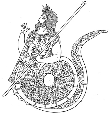 Kekrops